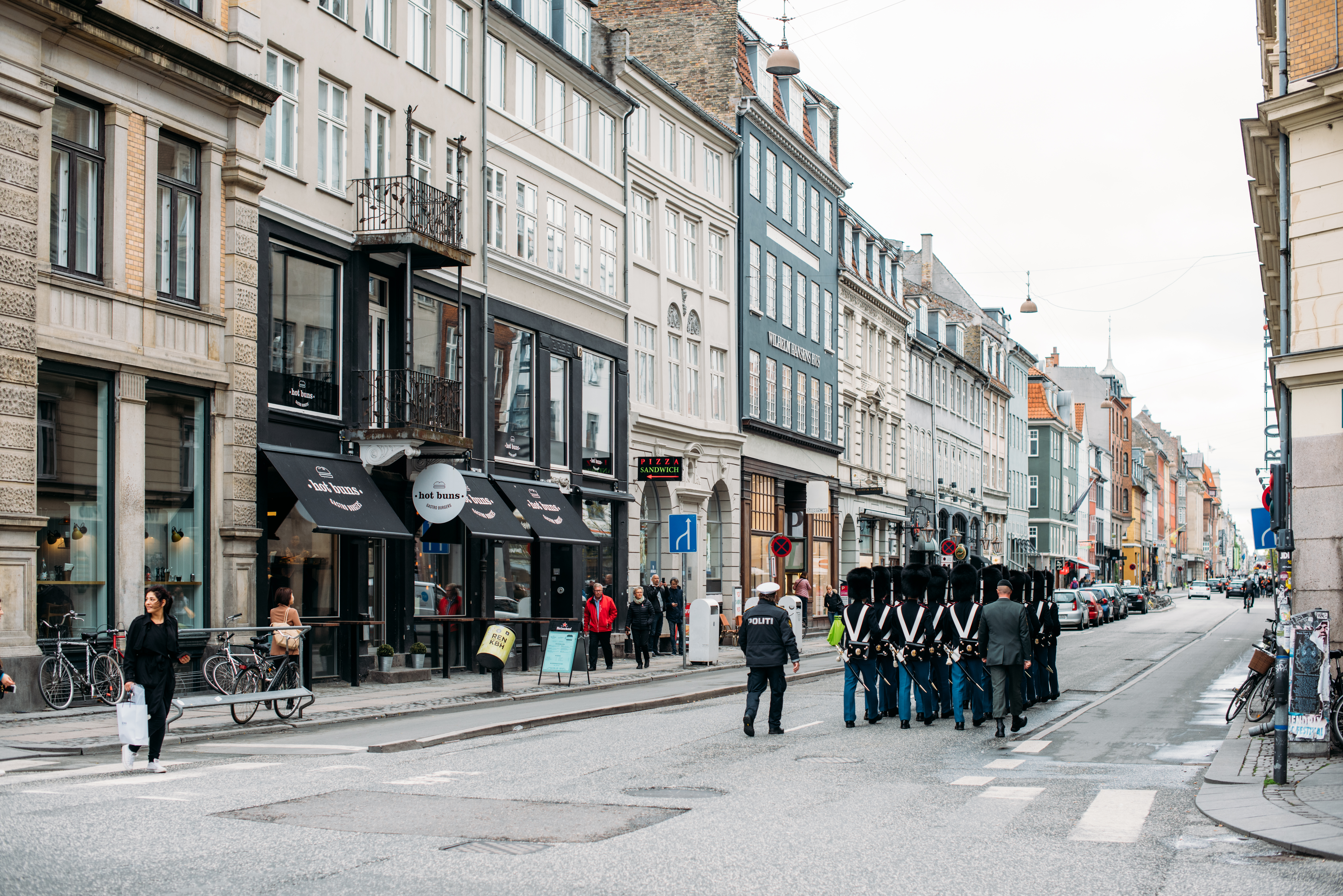 Copenhagen, Denmark